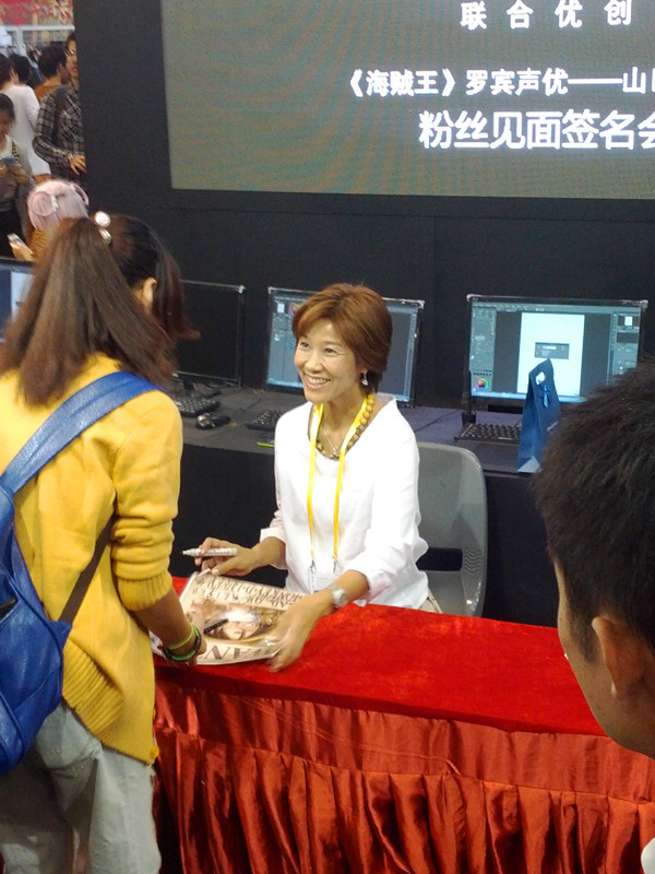 中文（中国大陆）: 山口由里子在厦门国际动漫节进行现场签名